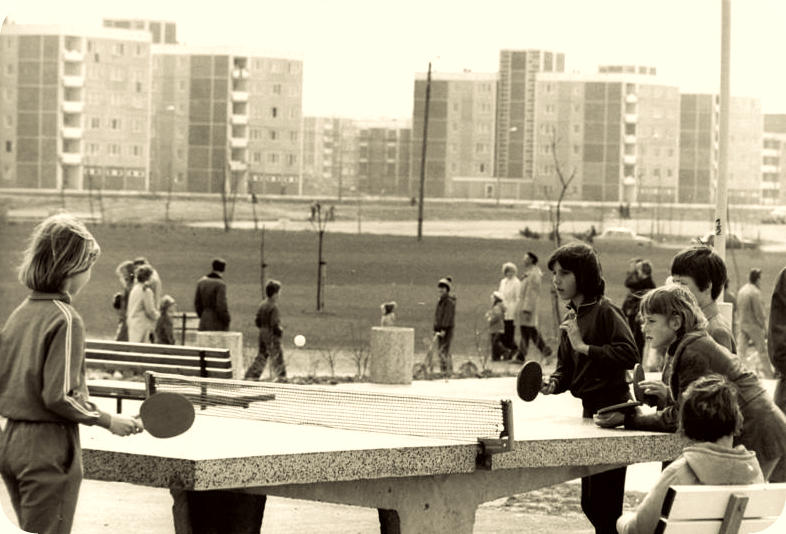 Rostock, Tischtennis ADN-ZB Sindermann 5.8.76 Rostock-Erholung und Entspannung suchen die Einwohner der Rostocker Neubaugebiete Lütten Klein und Evershagen auf dem rund 320.000 Quadratmeter großen Erholungsgebiet zwischen beiden Stadtteilen. Nahezu 40 Betriebe der Stadt haben gemeinsam mit Hunderten Hausgemeinschaften als Beitrag zum IX. Parteitag der SED diese Anlage für Sport und Spiel geschaffen. Hier eine Gruppe Jugendlicher beim Tischtennisspiel. Für die etwa 60.000 Einwohner der beiden Stadtteile entstand auch ein zünftiges Fischerdorf, das sich großer Beliebtheit erfreut.